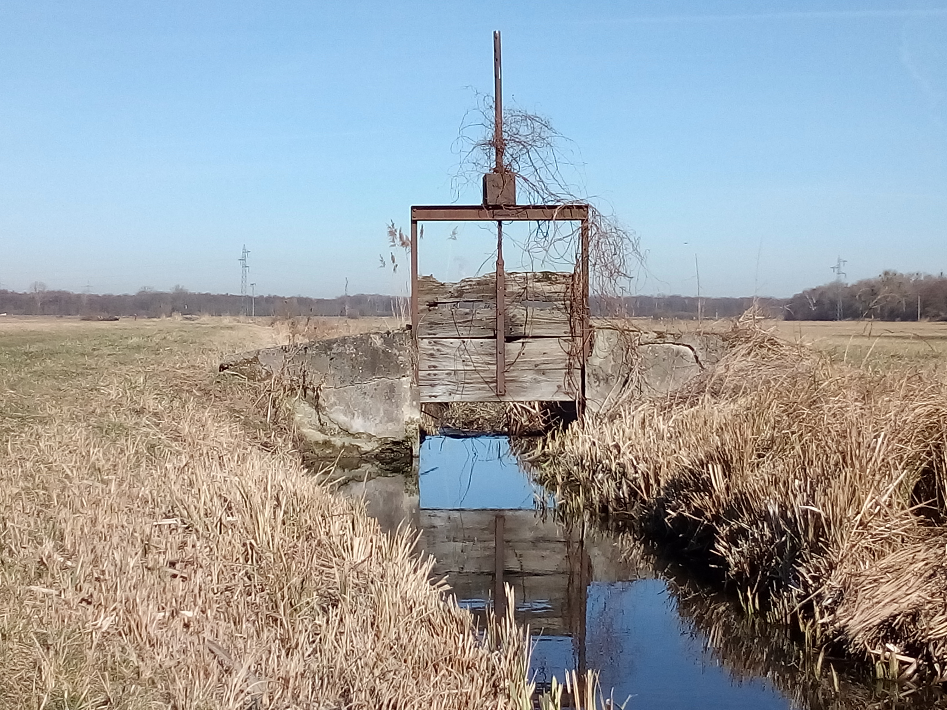 Stellfalle der ehemaligen Wiesenwasserung am Neugraben im Naturschutzgebiet Oberbruchwiesen bei Graben-Neudorf